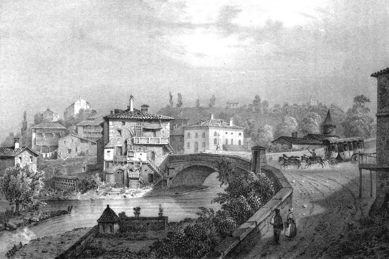 Vue de Rives au début du XIX° siècle (Le Bas-Rives) / Rives, Isère, France